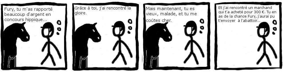 Illustration d'un problème d'éthique dans la relation entre un cheval et son propriétaire. Bande dessinée en noir et blanc de 4 images. Un cavalier s'adresse à son cheval. Image 1 : Fury, tu m'a rapporté beaucoup d'argent en concours hippique… Image 2 : Grâce à toi, j'ai rencontré la gloire. Image 3 : Mais maintenant, tu es vieux, malade, et tu me coûtes cher. Image 4 : Et j'ai rencontré un marchand qui t'a acheté pour 300 €. Tu en as de la chance Fury, j'aurai pu t'envoyer à l'abattoir…